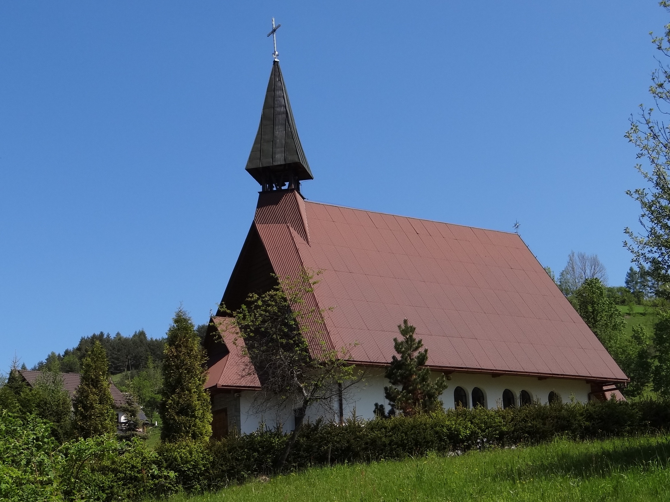 Kaplica w sołectwie Młynne w Ochotnicy Dolnej